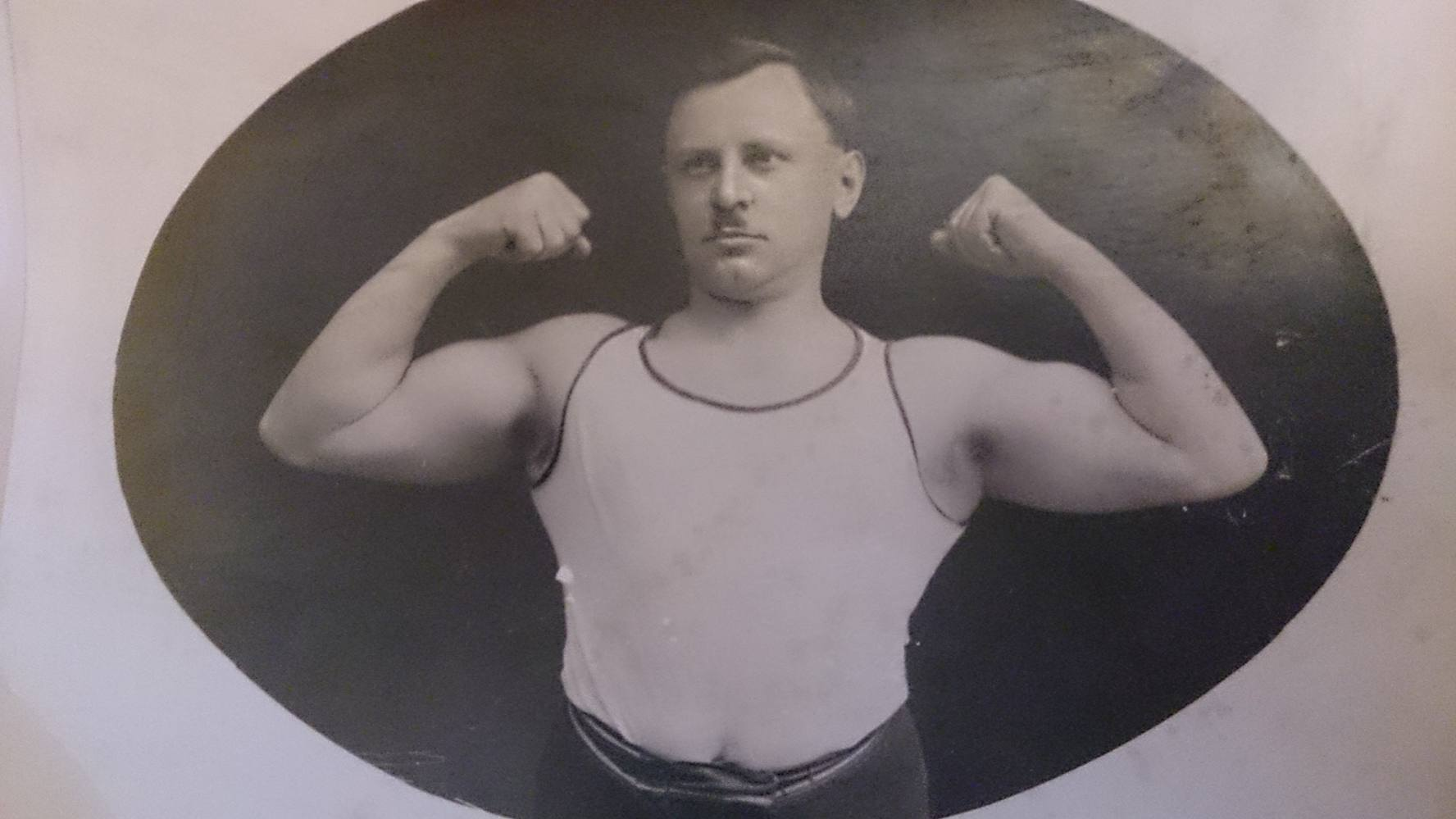 Příprava na sokolský slet 1925